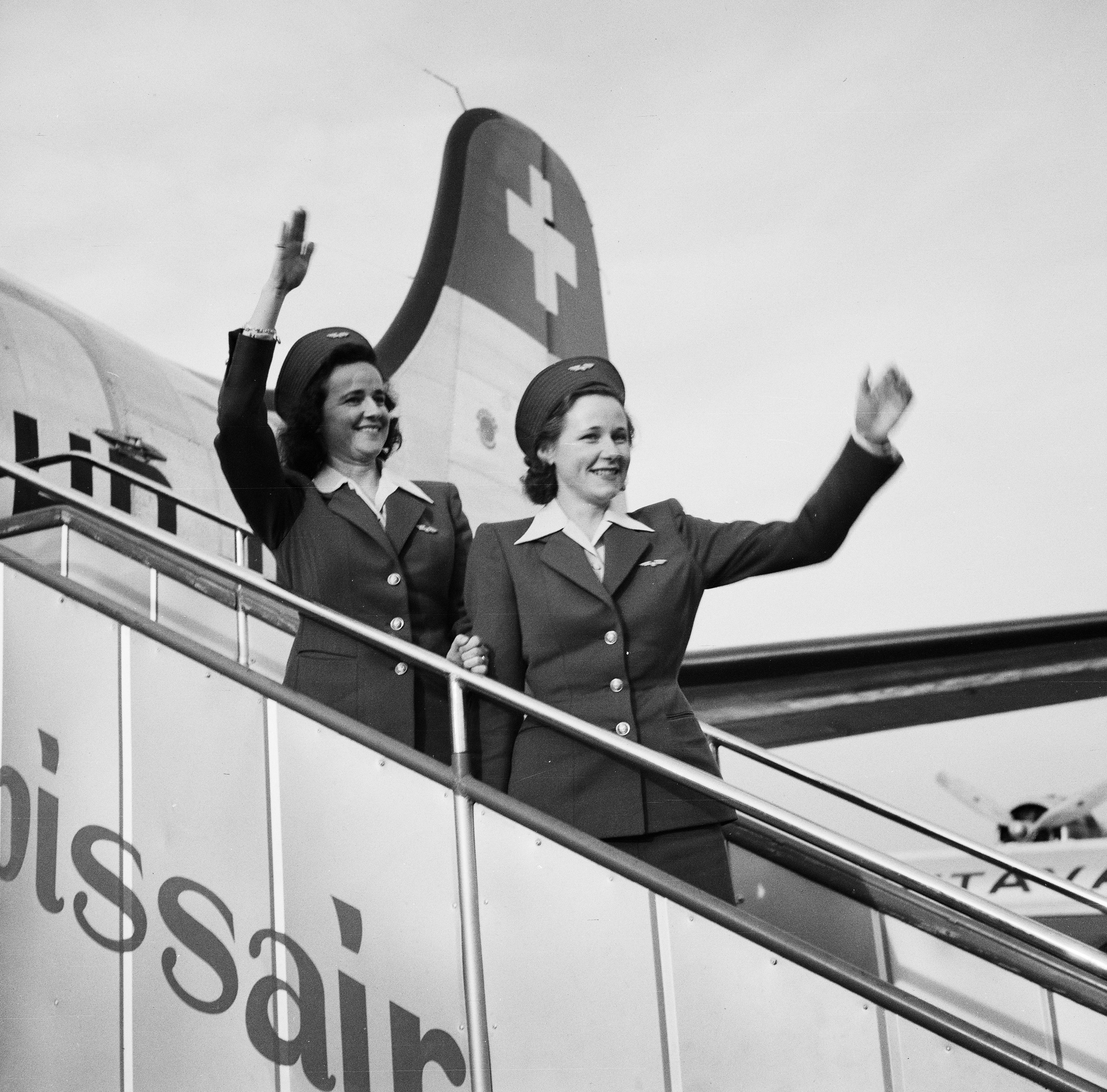 Erste Swissair DC-4, HB-ILA, die nach einem Flug über den Atlantik mit Captain Otto Heitmanek am 24.11.1946 in Genf landete. Dieser Anlass wurde entsprechend gefeiert und das Flugzeug auf den Namen "Genève" getauft